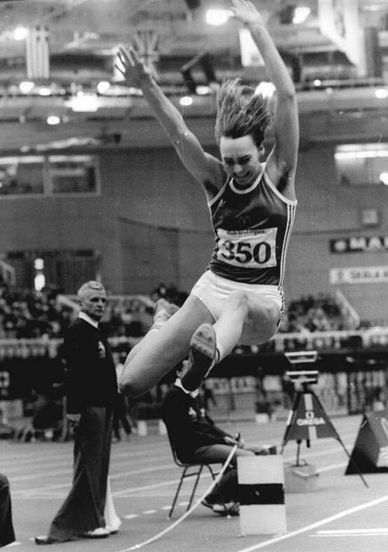 Heike Daute ADN-ZB Kluge 21.1.84 Bez. Cottbus: Hallenmeisterschaften der DDR-Leichtathleten in Senftenberg. Mit 6,99 m erzielte Heike Daute (SC Motor Jena) am 21.1.84 bei den Hallemeisterschaften der DDR-Leichtathleten eine neue Hallen-Weltbestleistung im Weitsprung. Im sechsten Versuch verbesserte die 19jährige Weltmeisterin von Helsinki die bisherige Höchstmarke der Rumänin Anisoara Cusmir aus dem vergangenen Jahr um 5 cm. Foto von der Hallen-EM 1983